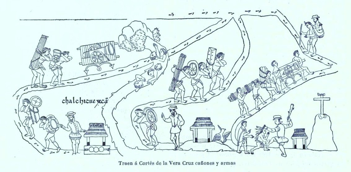 Lienzo de Tlaxcala. Representación del transporte de armamento de Veracruz (Chalchicueyan) a Tlaxcala durante las campañas de la conquista de México.